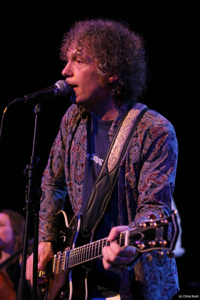 Spinvis optreden in Drachten, 2006 . Foto: C. Kuhl /